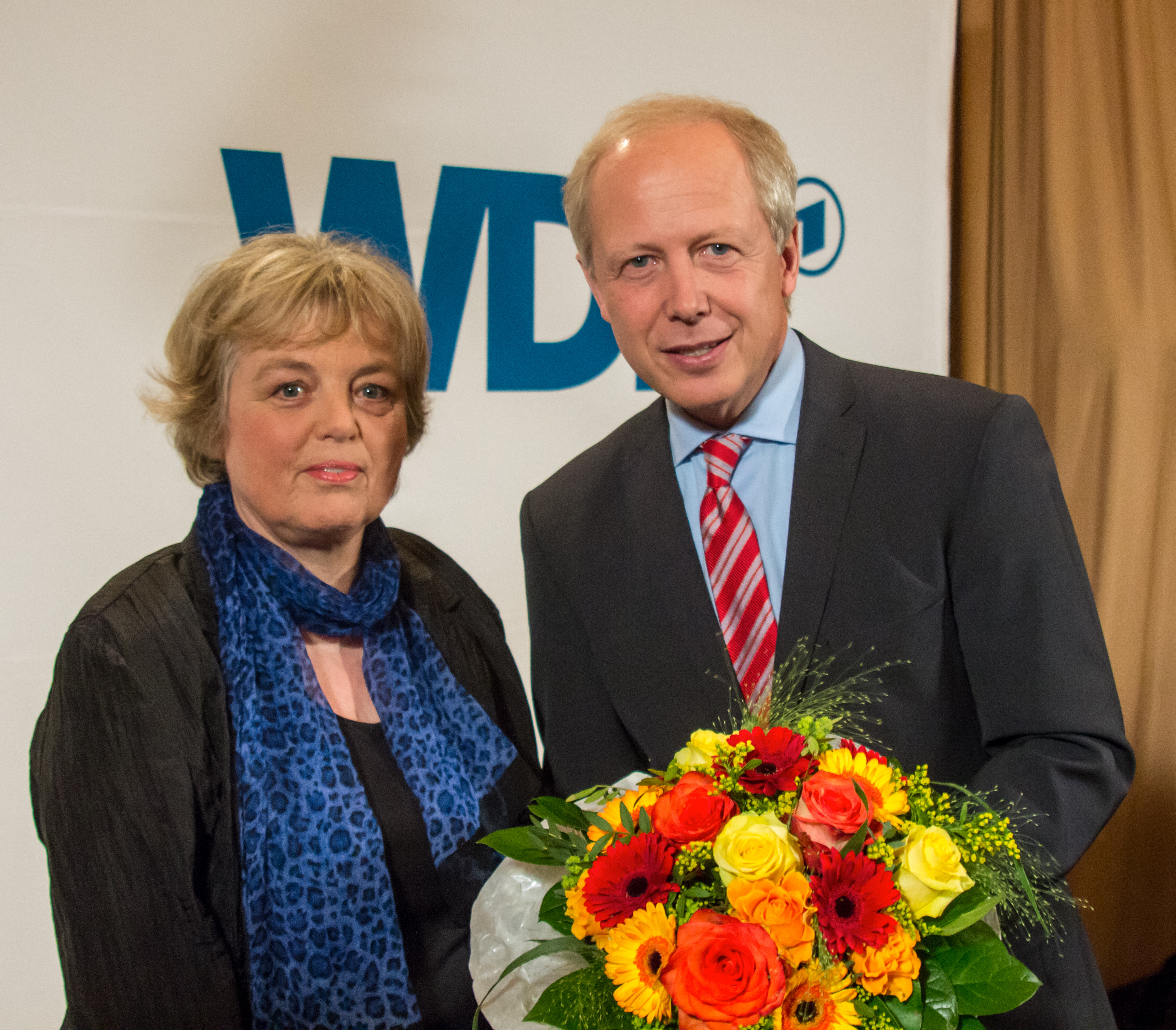 Ruth Hieronymi und Tom Buhrow bei der Pressekonferenz zur Wahl Buhrows als WDR-Intendant am 29.5.2013